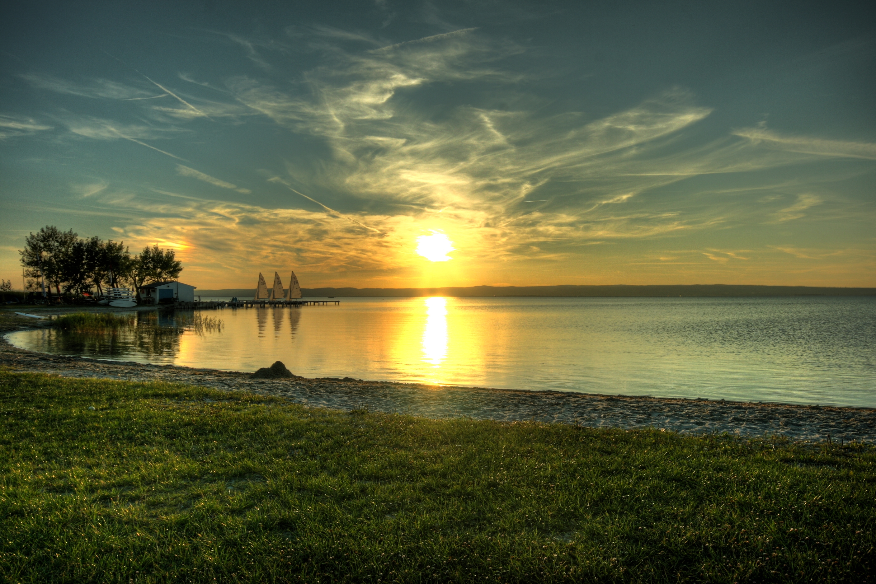 Podersdorf Nordstrand - Sonnenuntergang